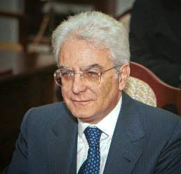 Sergio Mattarella